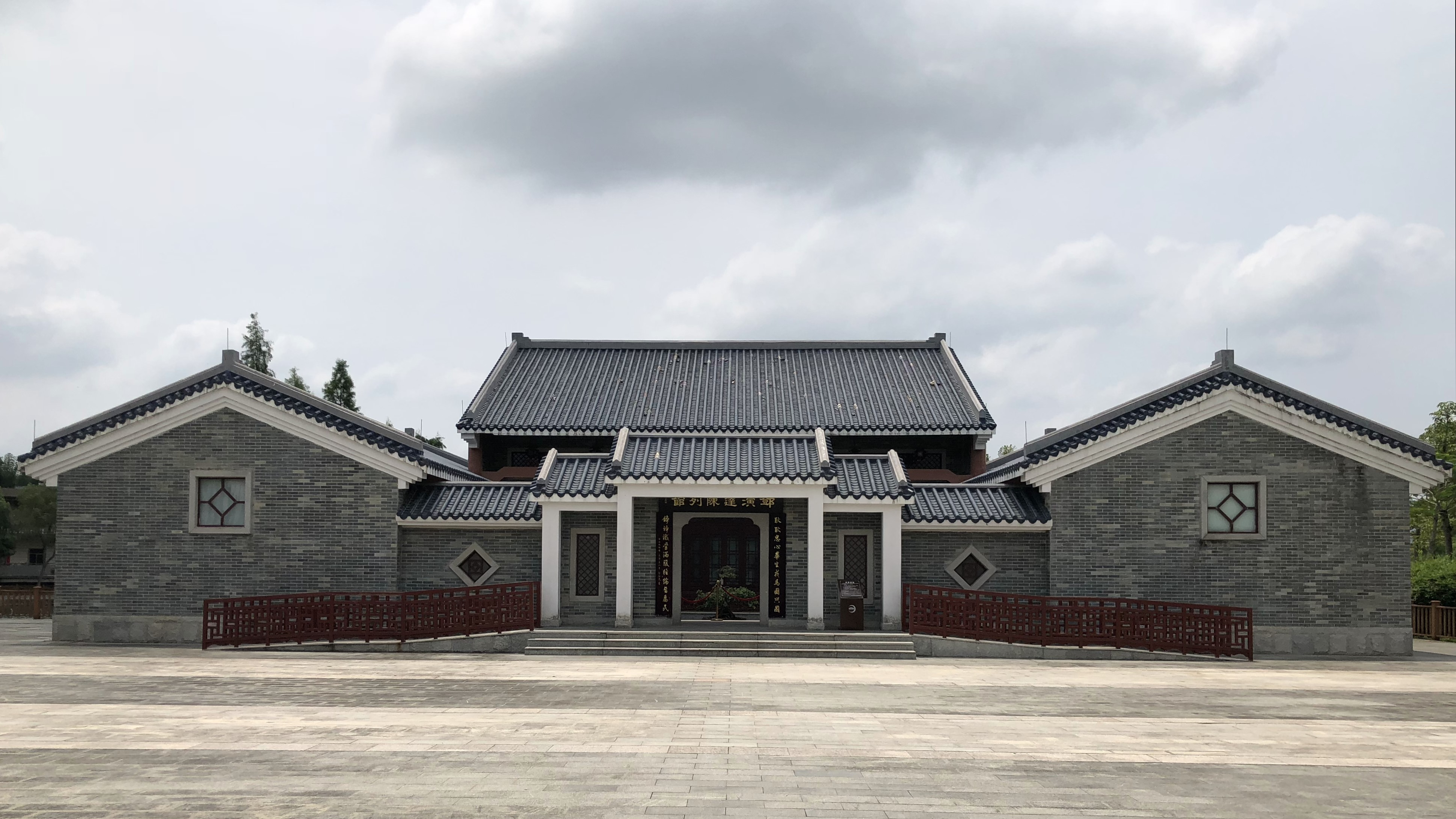 邓演达纪念馆